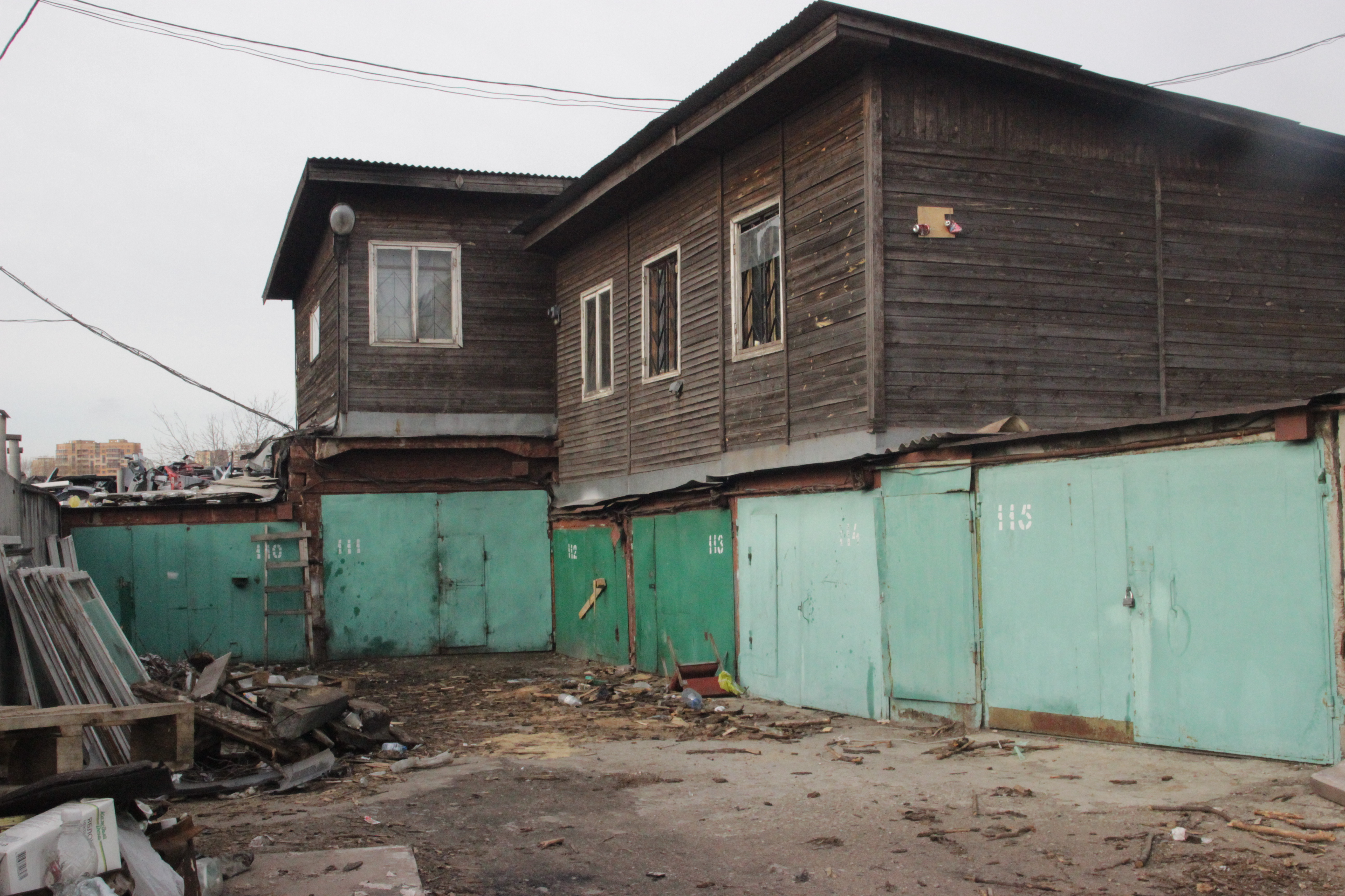 Если на юге жилые гаражи сдаются отдыхающим и предполагают высокую степень комфортабельности, то в центральной России в гаражах проживают в основном вахтовики и мигранты.